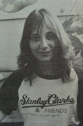 María Rosa Yorio. Cantante. Argentina.